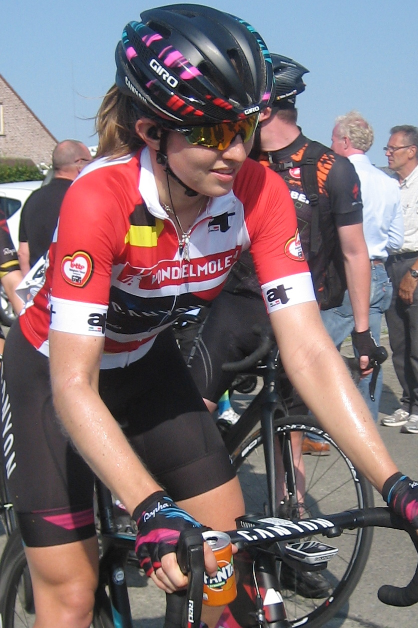 Na de finish van de 2e etappe van de Lotto Belgium Tour 2016 in Lierde.